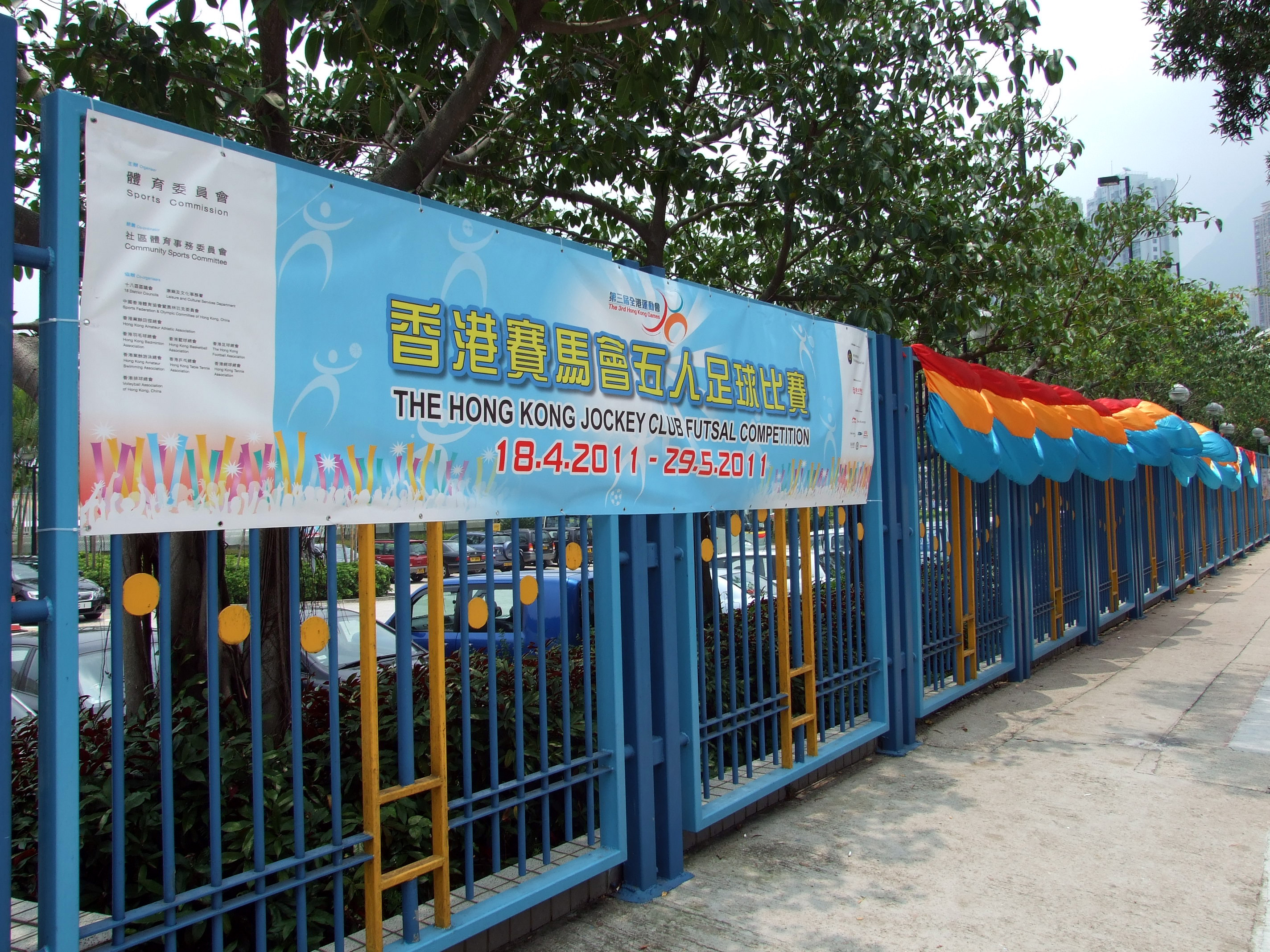 香港賽馬會五人足球比賽橫幅